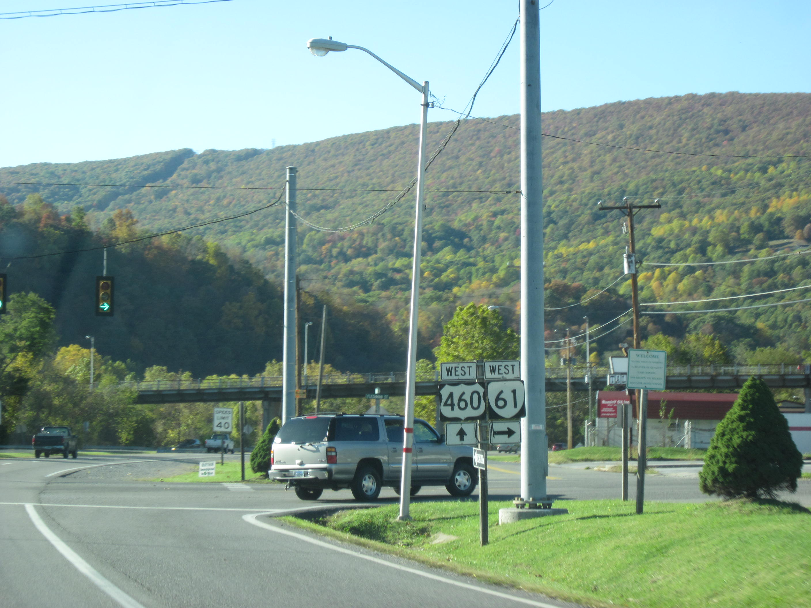 US Route 460 - Virginia